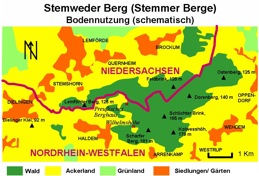 Bodennutzung des Stemweder Berges